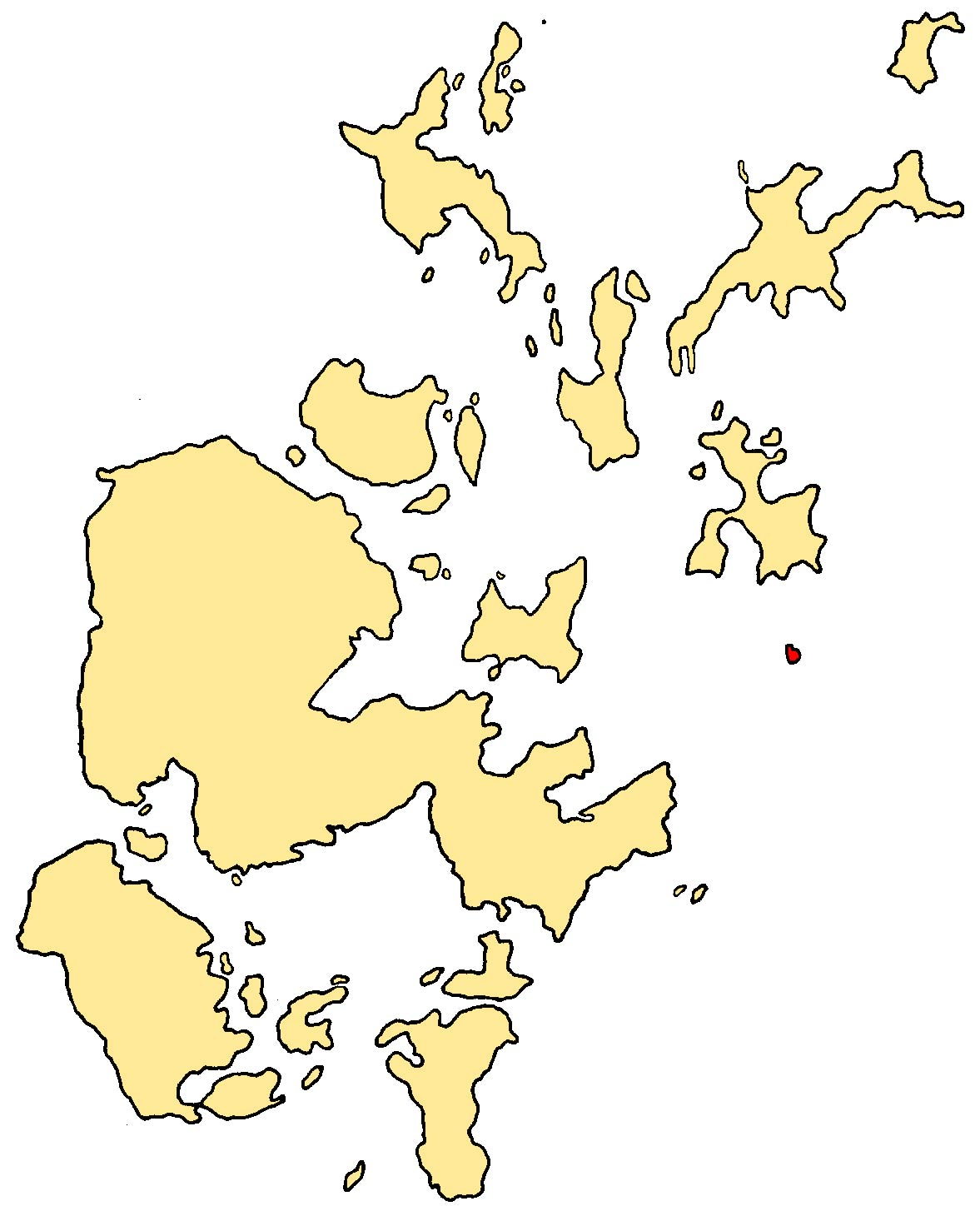 Auskerry